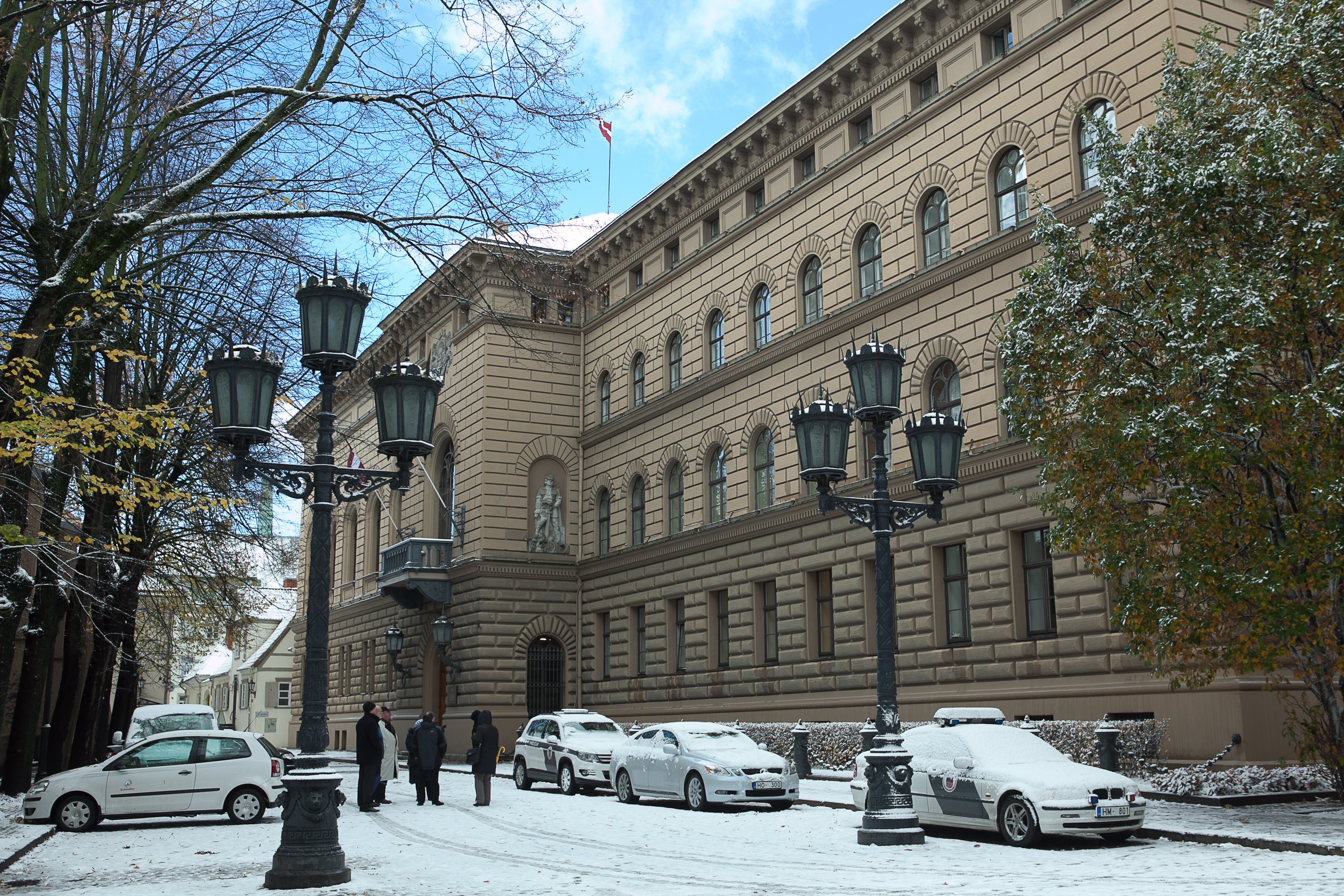 2012.gada 26.oktobris. Pirmais sniegs pārvērtis arī Saeimas apkārtni. Foto: Ernests Dinka, Saeimas Kanceleja.